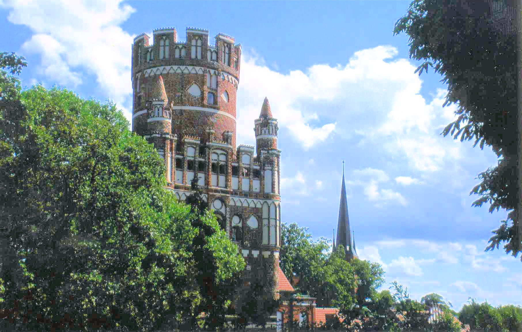 Uenglinger Tor (mit Petrikirche im Hintergrund)